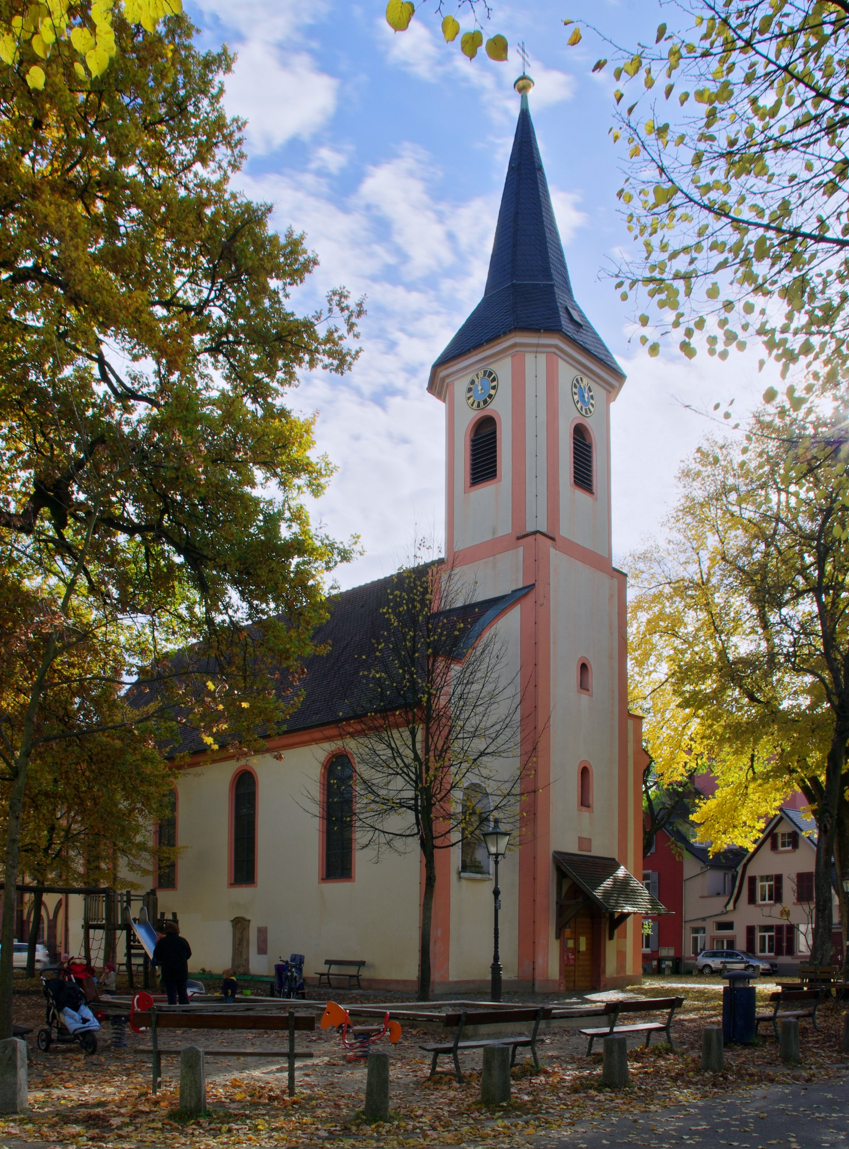 St. Cyriak und Perpetua ist eine kleine Kirche auf dem Annaplatz in Freiburg, deswegen wird sie auch das Anna-Kirchle genannt